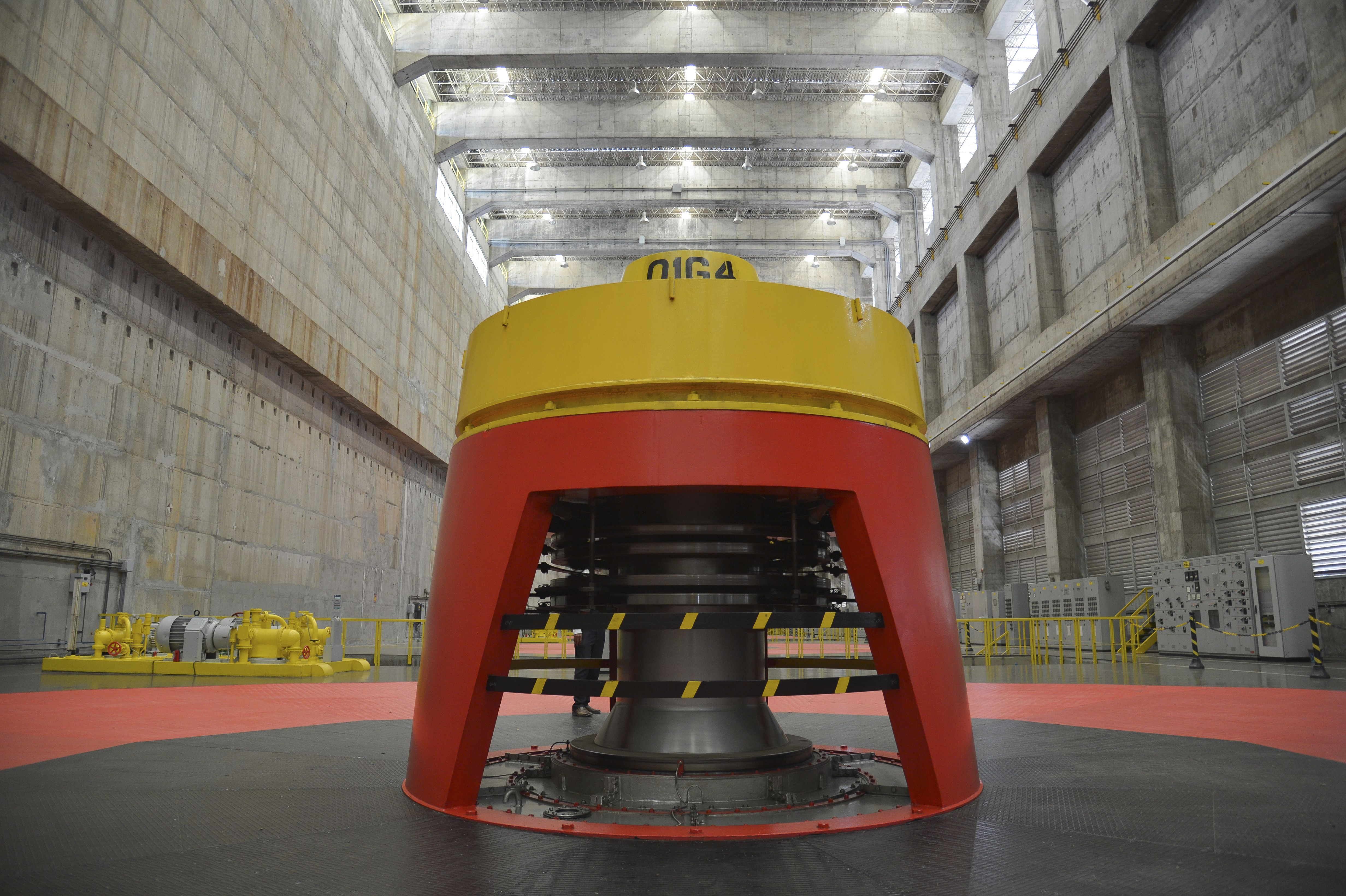 (BA) - No maior reservatório do Nordeste, o nível da água é o mais baixo dos quase 40 anos da barragem de Sobradinho